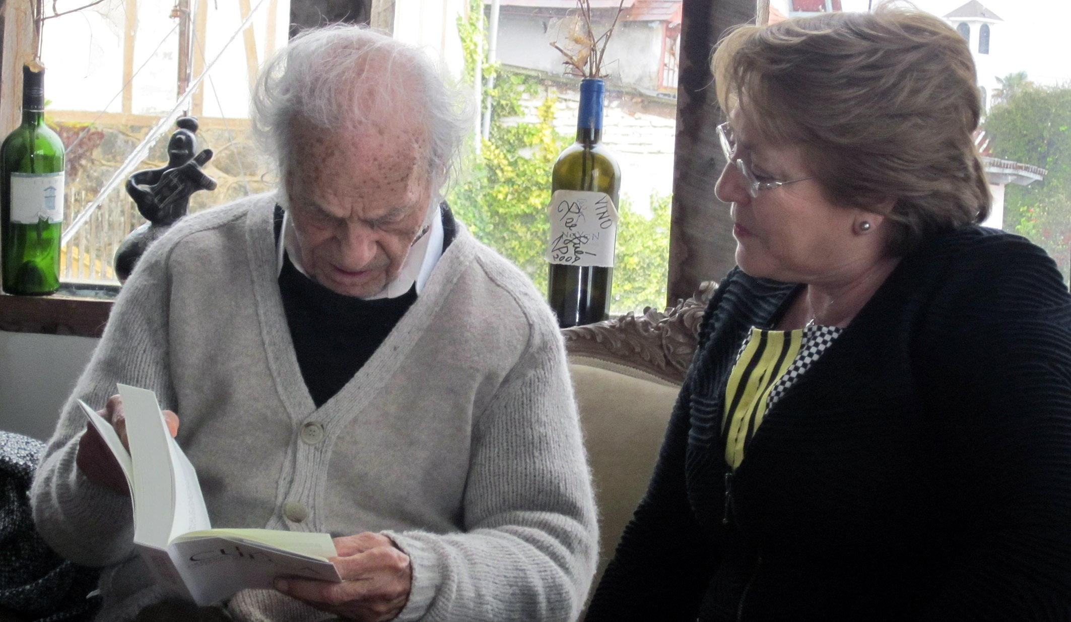 Gobierno de Chile. Presidenta Michelle Bachelet, visitó al poeta Nicanor Parra por la celebración de su cumpleaños Nº 100